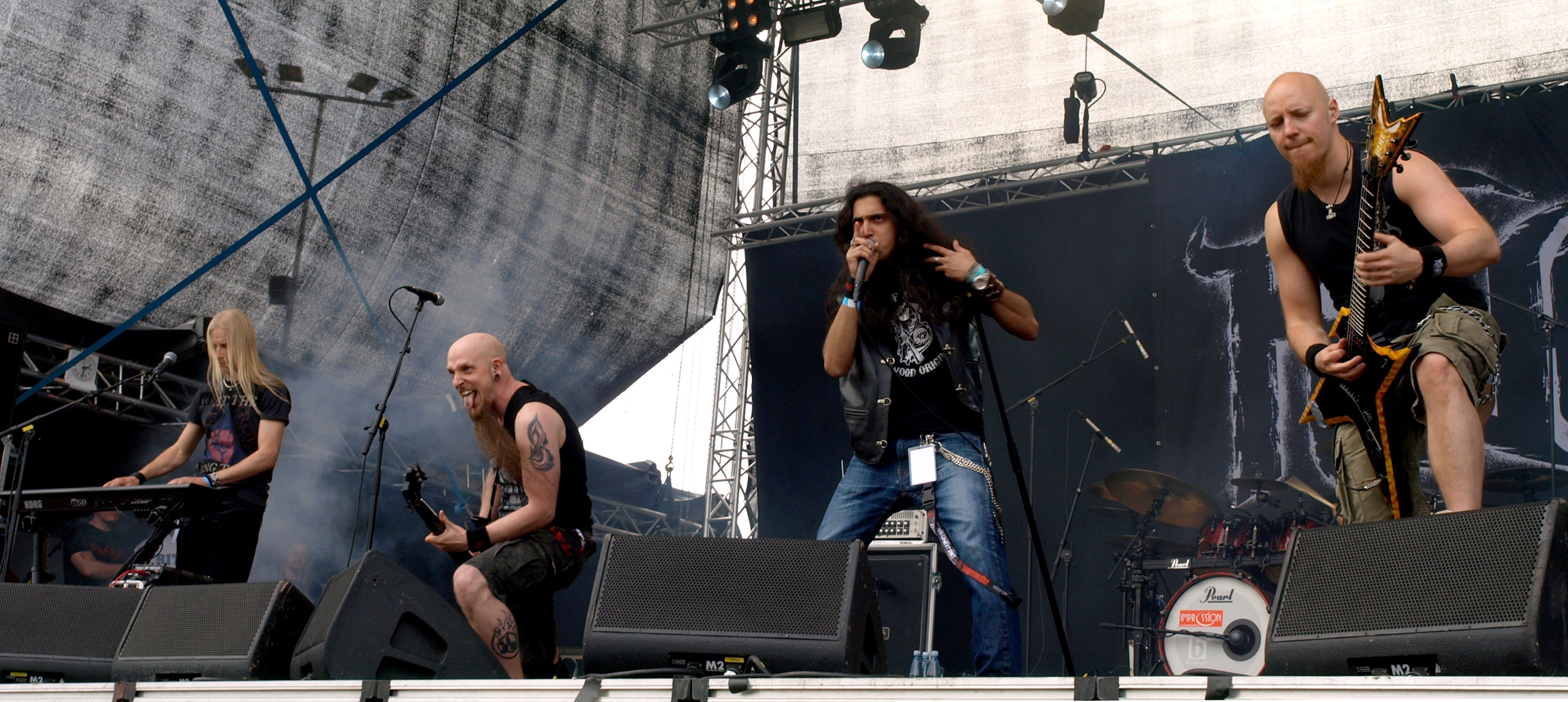 Kiuas live am Myötätuulirock 2011